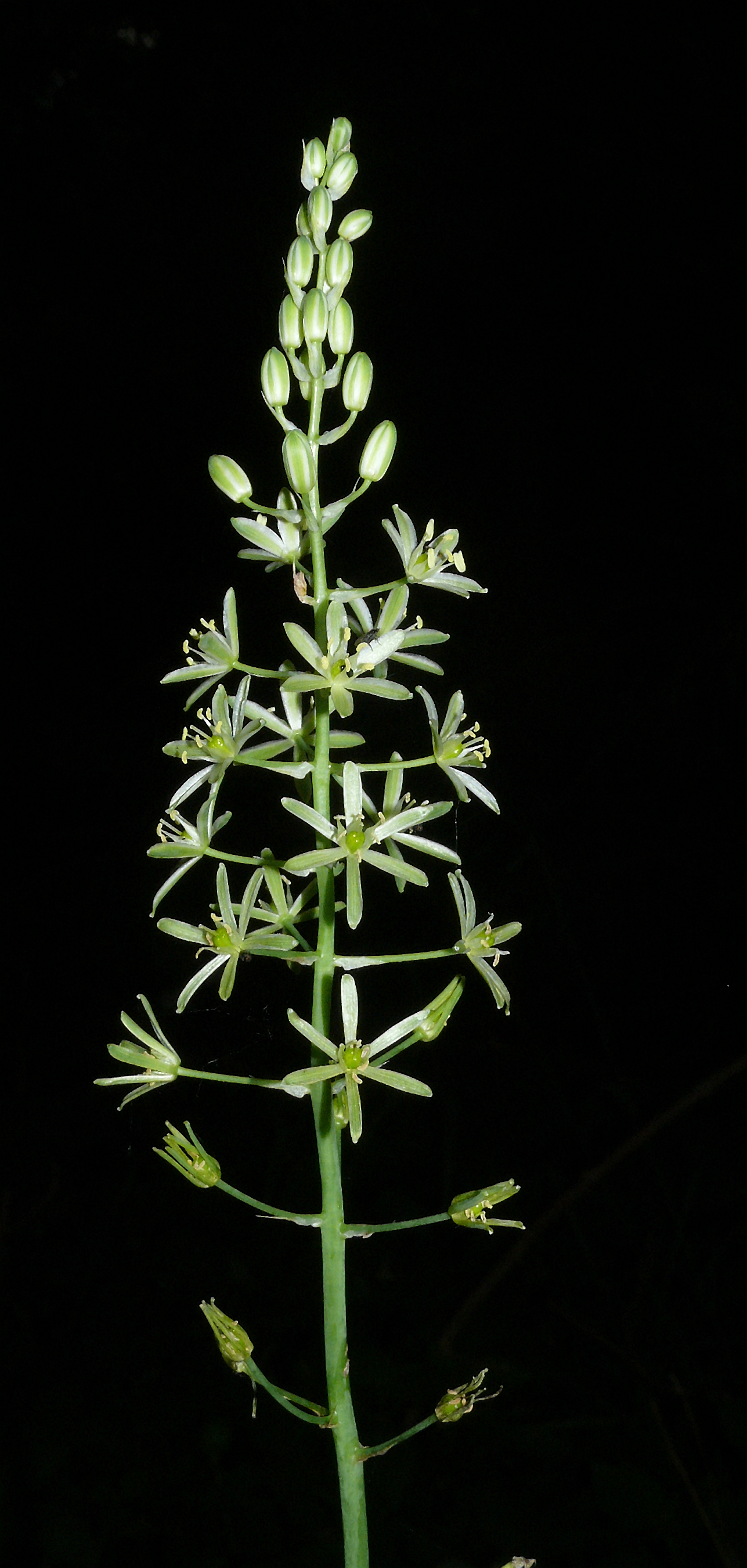 Ornithogalum pyrenaicum, Hohenlohe, Deutschland